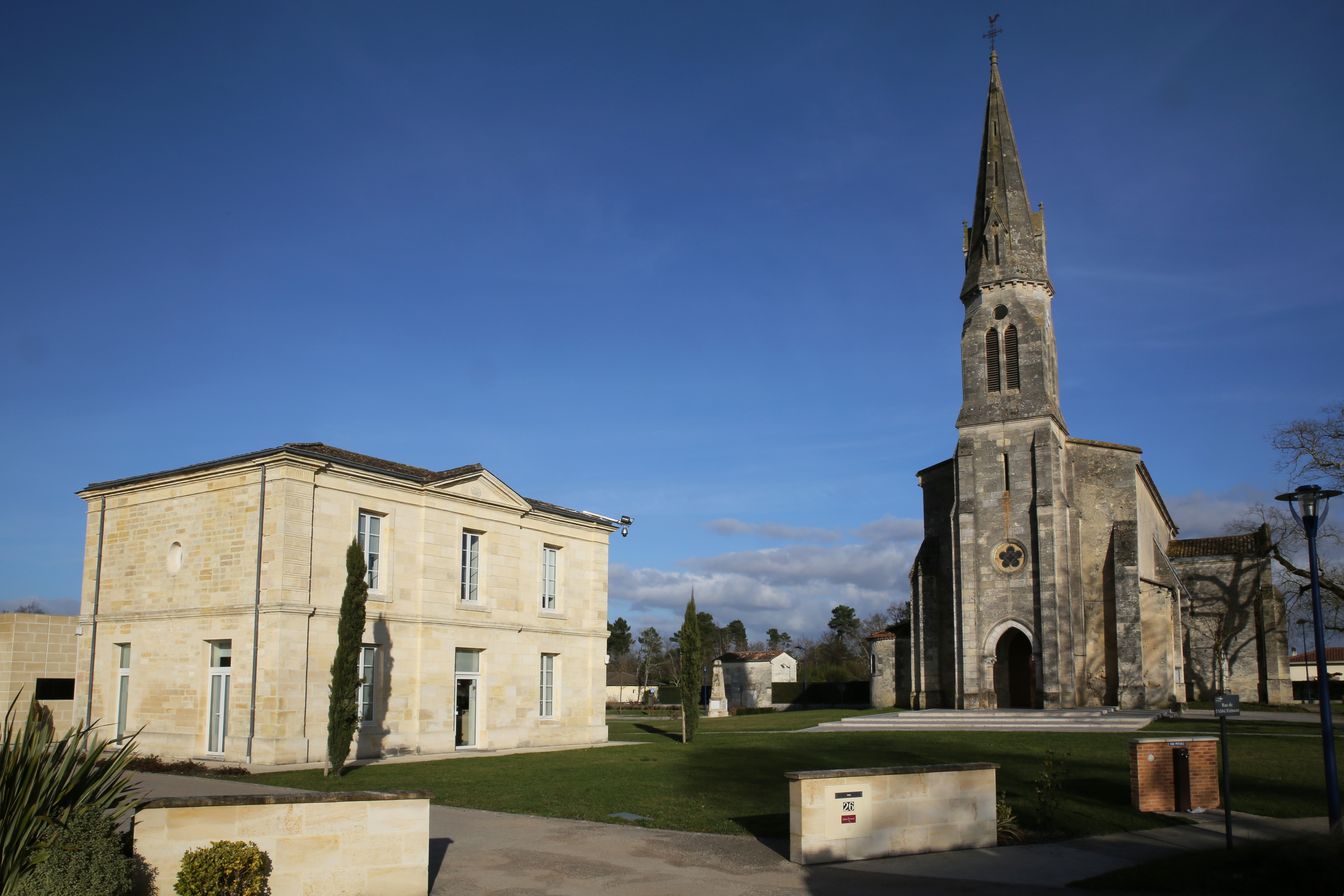 Siège de la communauté de communes Médoc estuaire et église d'Arsac